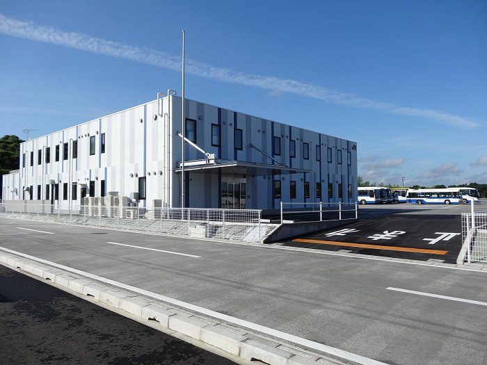 ジェイアールバス関東東関東支店